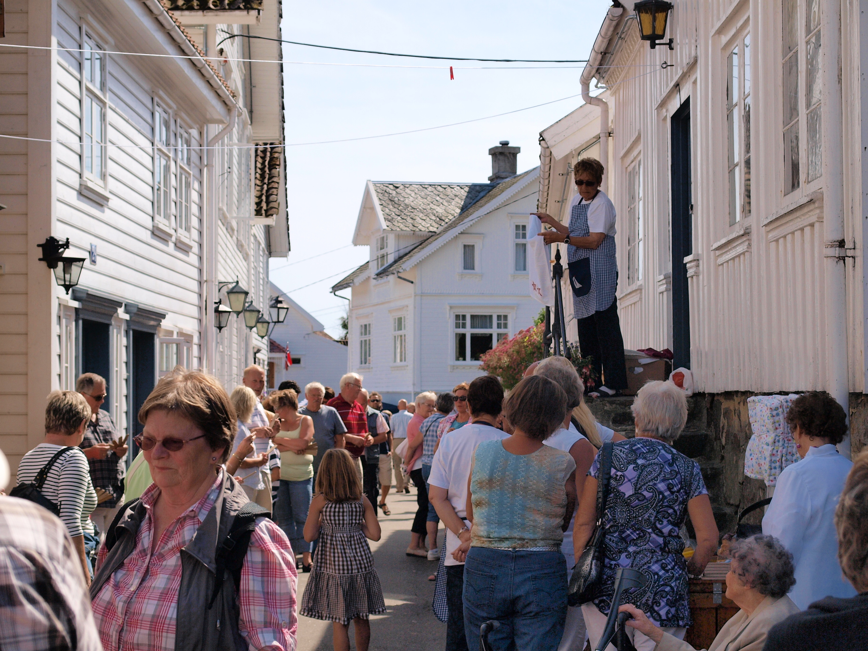 Gaten, "Gado", på Sogndalstrand. Her fra basar under Ladestedets kulturdag 14. august 2010.